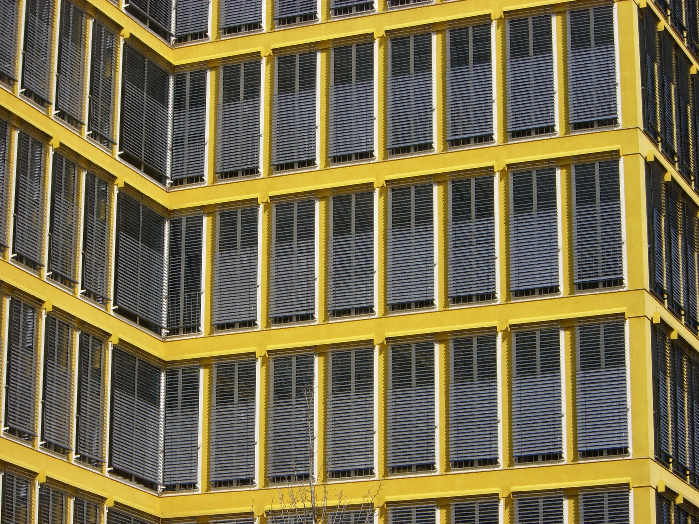 Detailansicht einer Fassadengestaltung von Otto Steidle auf der Münchner Theresienhöhe